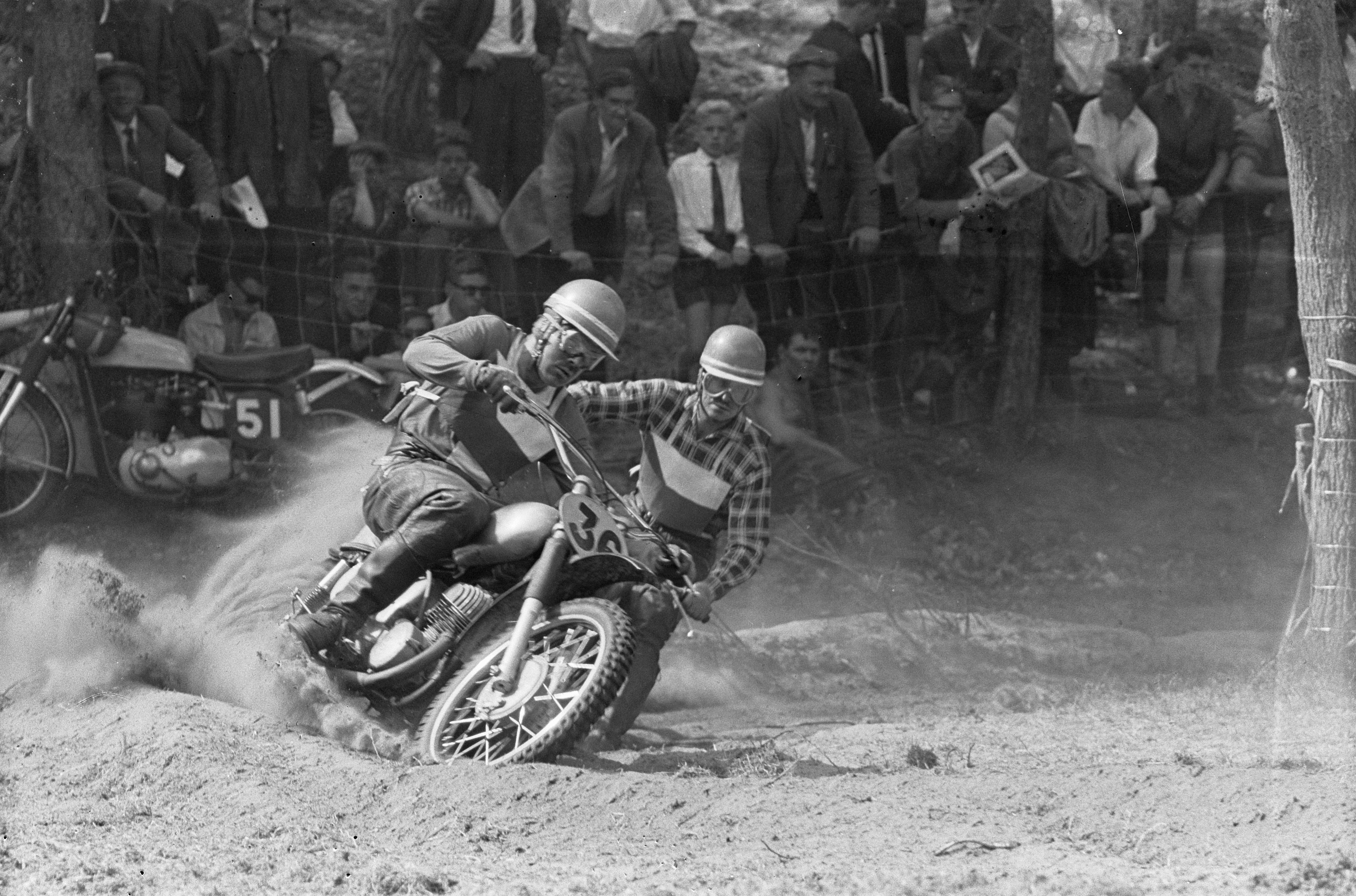 Collectie / Archief : Fotocollectie Anefo Reportage / Serie : [ onbekend ] Beschrijving : Grand Prix Motor Cross te Schijndel. Tijdens de eerste manche van de 250 cc Karel Pilar (nr. 36), achter hem no. 38 Vlastimil Valek allebei Tsjechen / Datum : 9 juni 1963 Locatie : Noord-Brabant, Schijndel Trefwoorden : motorraces Persoonsnaam : Vlastimil, Valek Fotograaf : Pot, Harry / Anefo Auteursrechthebbende : Nationaal Archief Materiaalsoort : Negatief (zwart/wit) Nummer archiefinventaris : bekijk toegang 2.24.01.05 Bestanddeelnummer : 915-2386